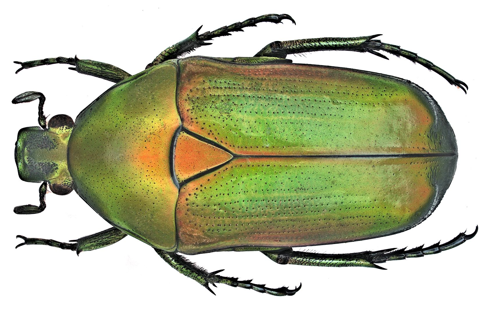 Familie: Scarabaeidae Groesse: 23 mm Fundort: Kamerun, Bamenda, 1998 det. U.Schmidt, 2006 Photo: U.Schmidt, 2006